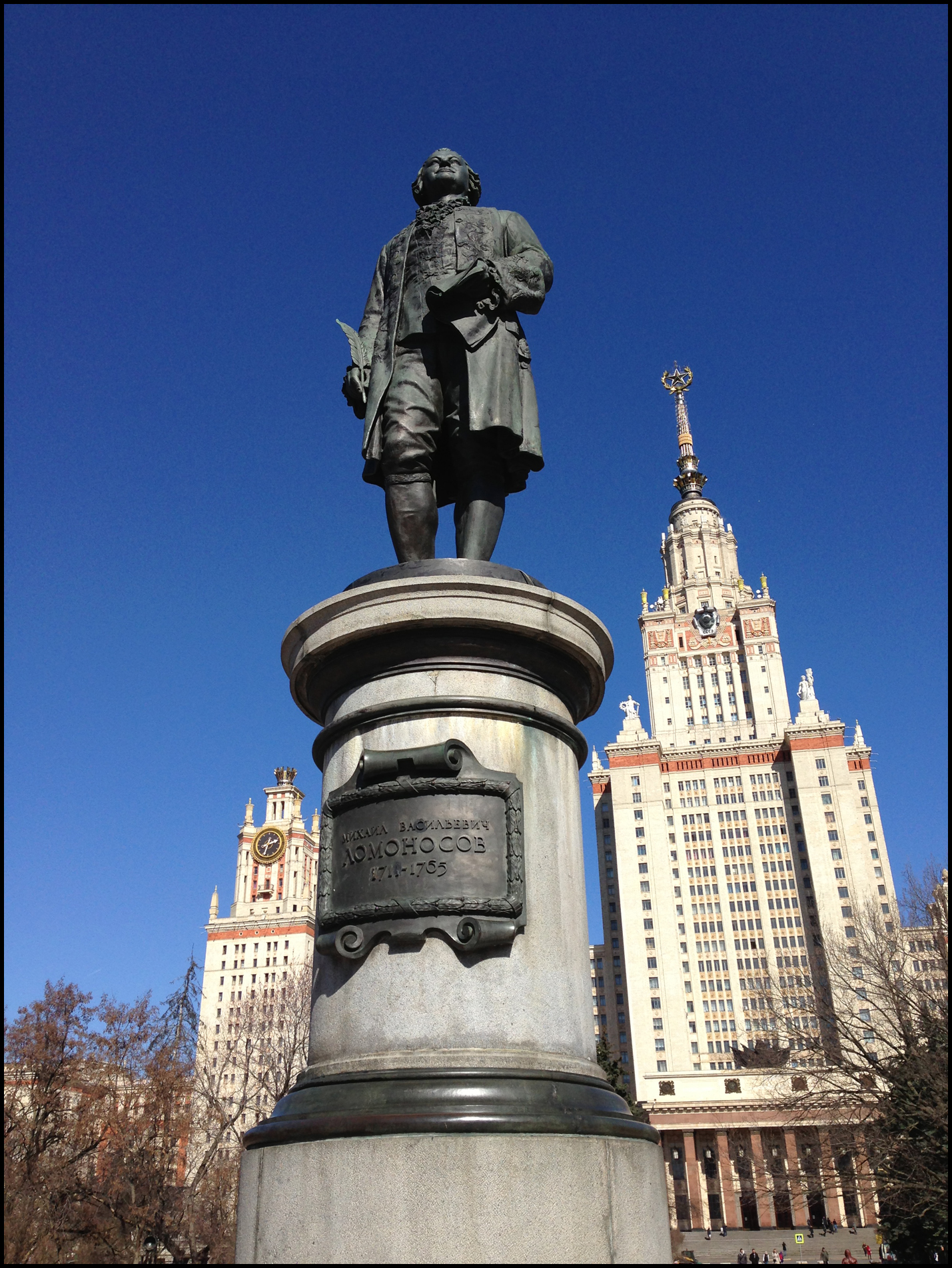 Памятник Ломоносову